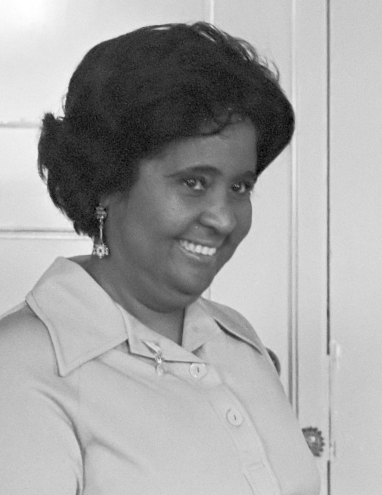 Hare Majesteit krijgt boek van Antilliaanse schrijfster Sonia Garmers op Soestdijk 25 mei 1976